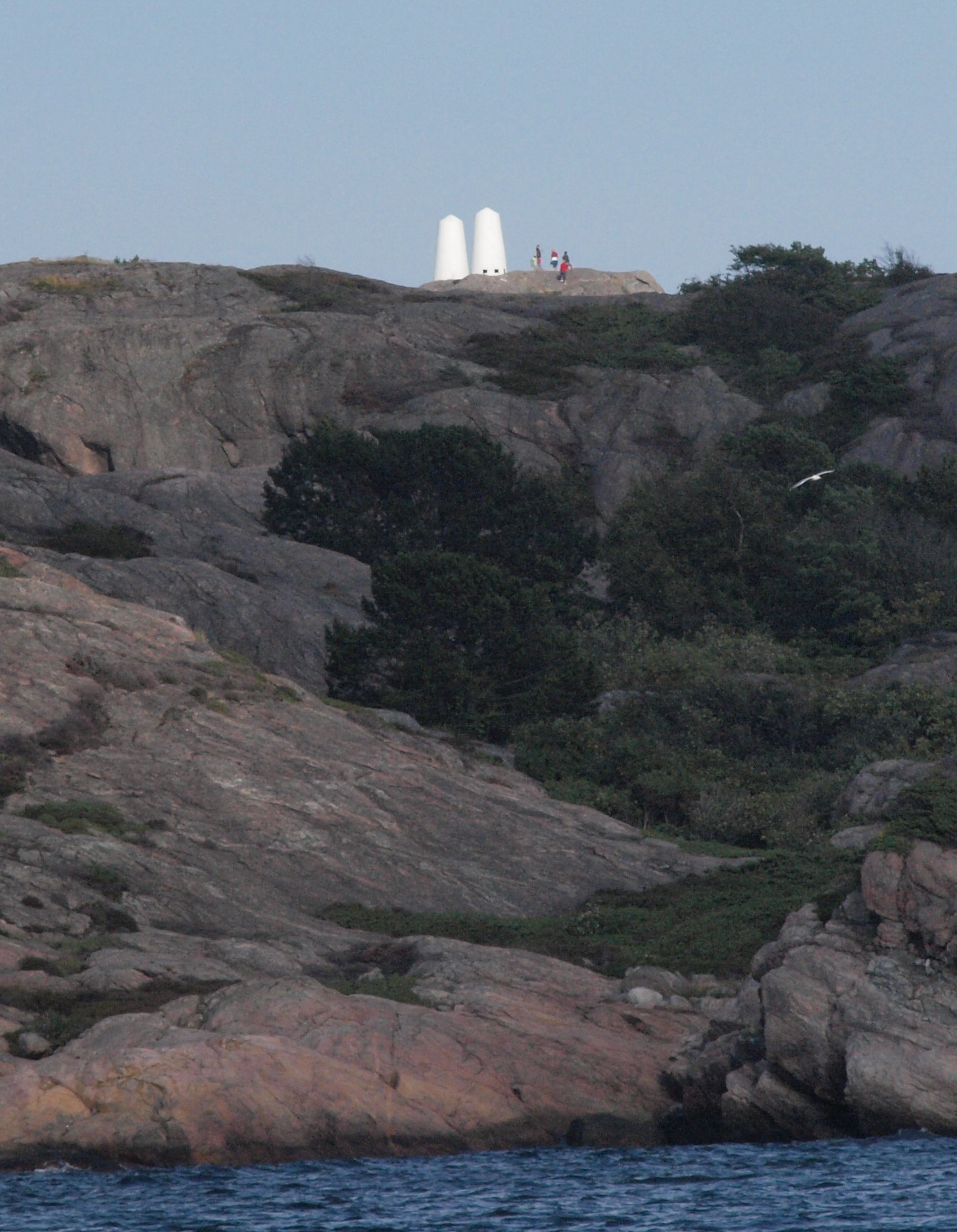 Hellevardane, Søgne